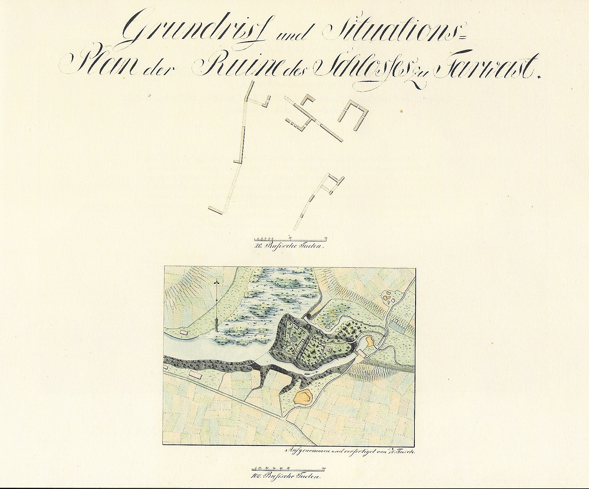 Tarvastu linnuse asendiplaan